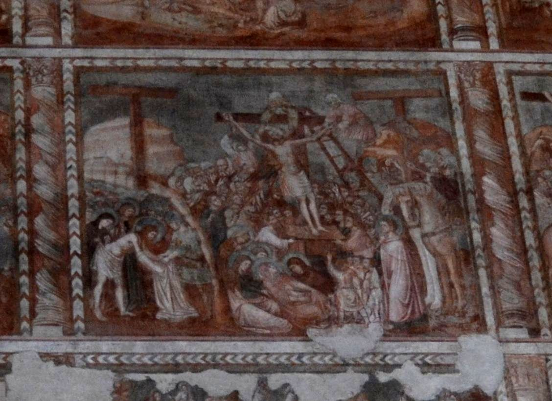 Chiesa di Santa Maria Donnaregina Vecchia (Napoli) - Coro delle monache: scena della Deposizione